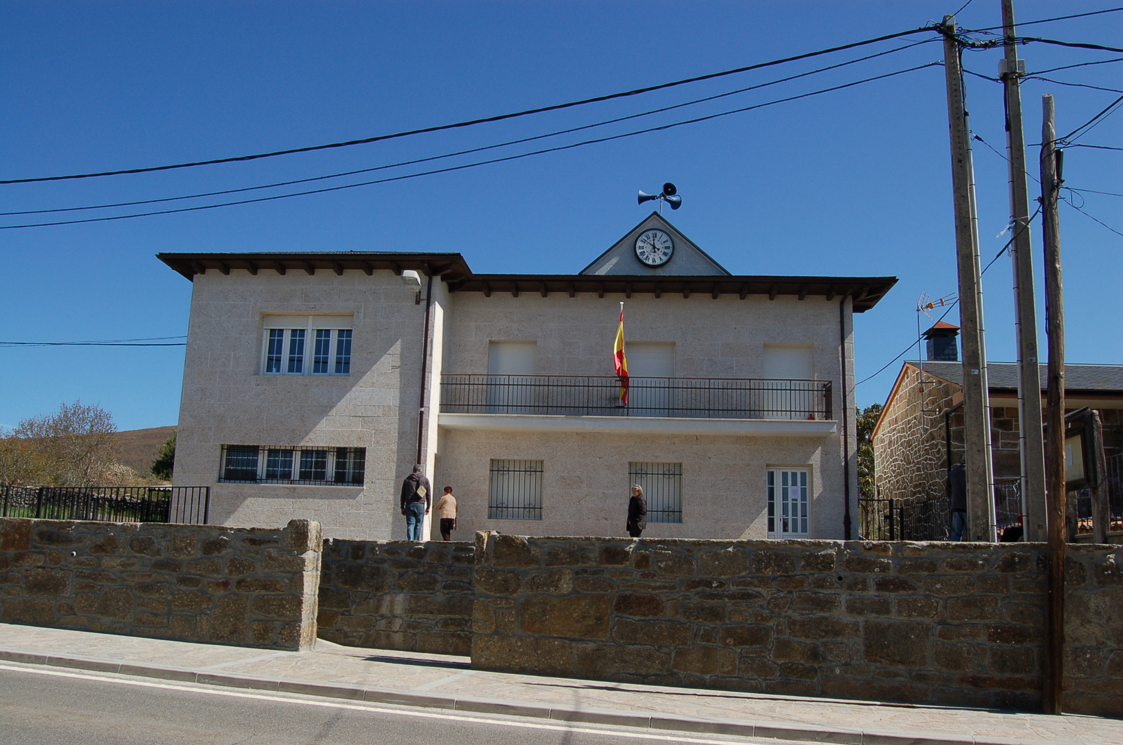 Casa consistorial de Asturianos